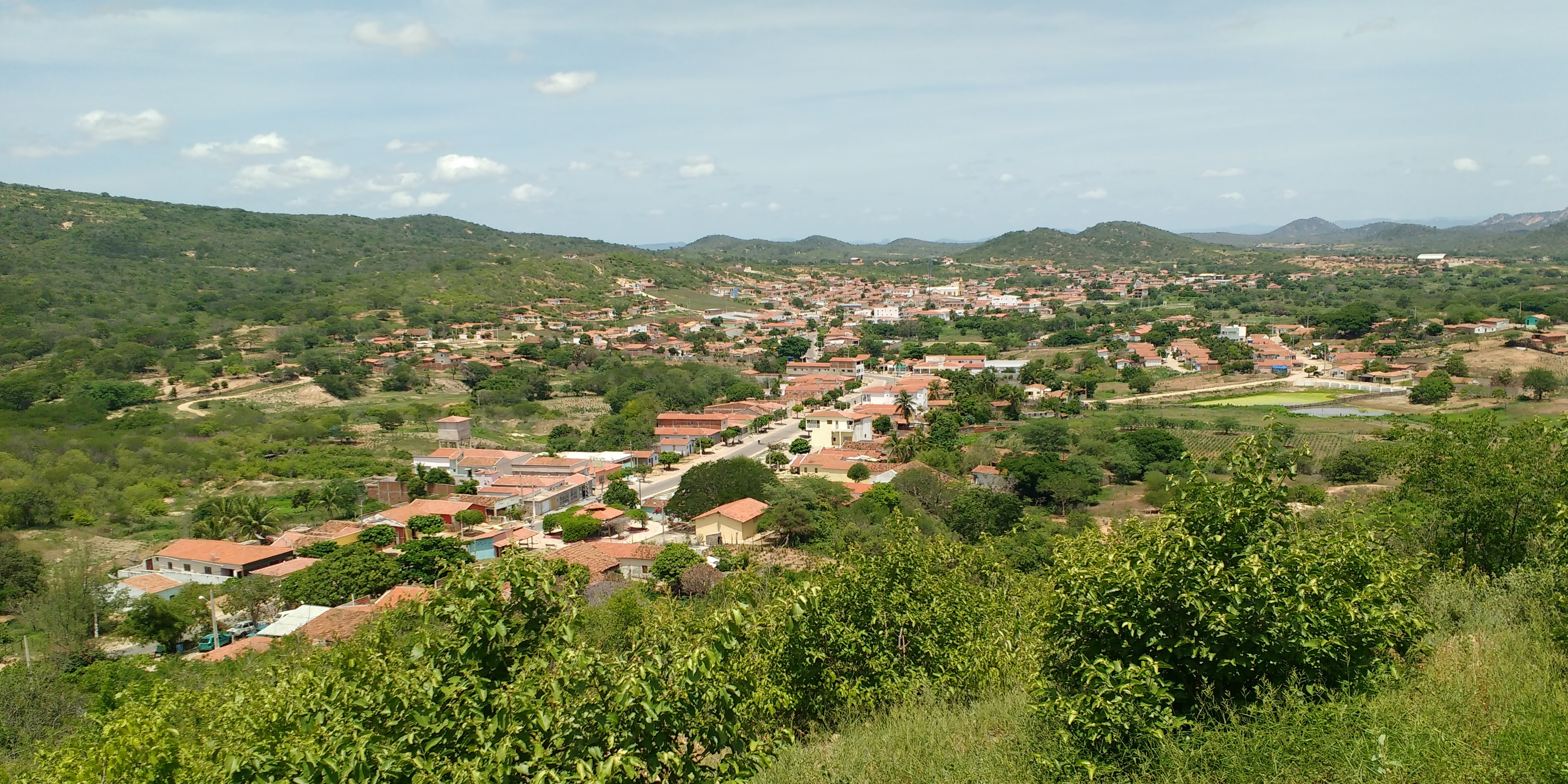 Panorama de Antônio Martins, Rio Grande do Norte (Brasil), a partir do Mirante e Santuário São José.